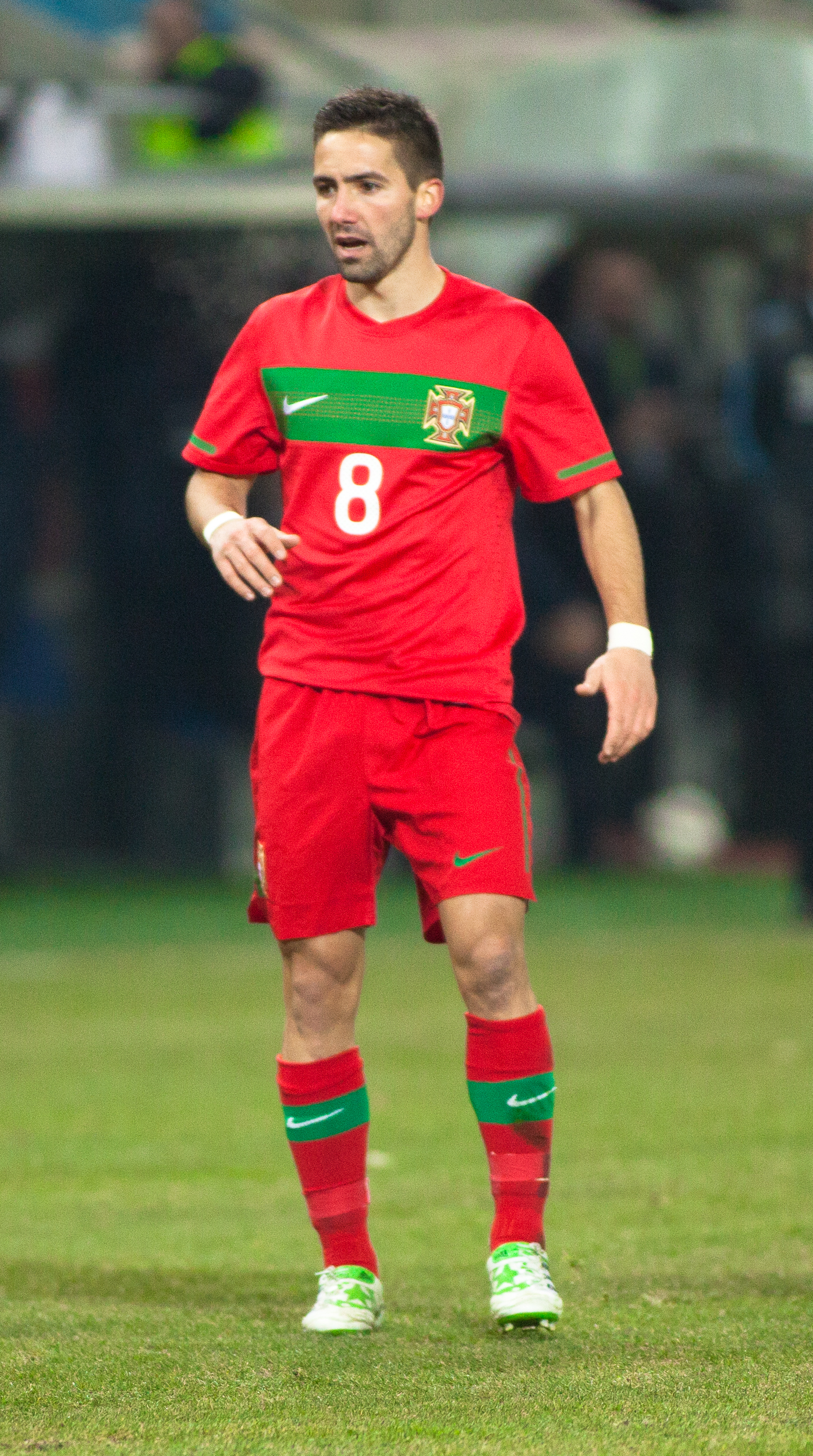 João Moutinho lors du match amical Argentine-Portugal le 9 février 2011 à